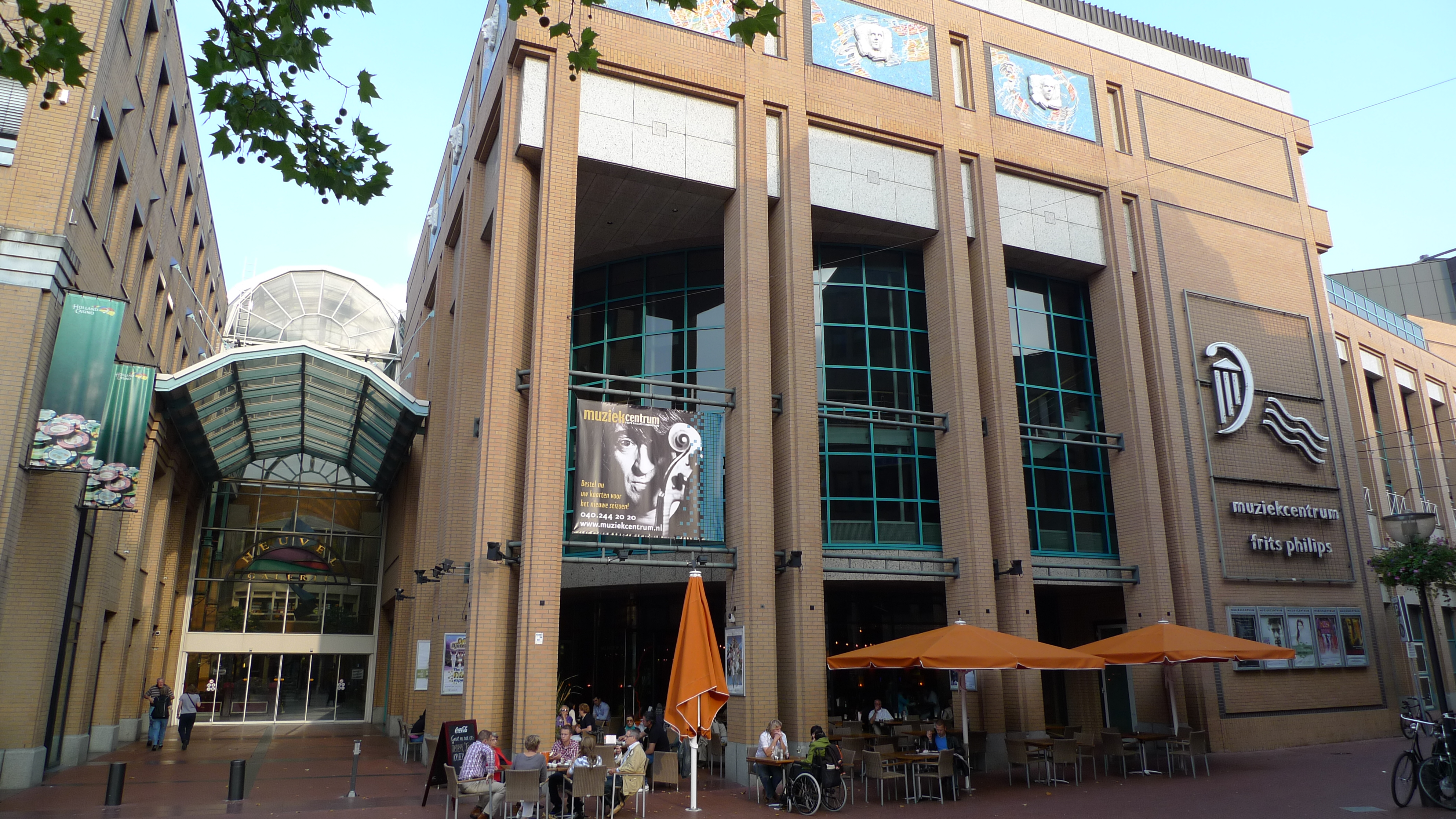 Ingang muziekcentrum Frits Philips in Eindhoven